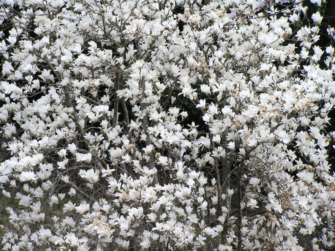 ハクモクレン 【おぉたむ すねィく探検隊】写真部門 担当 大原佳苗